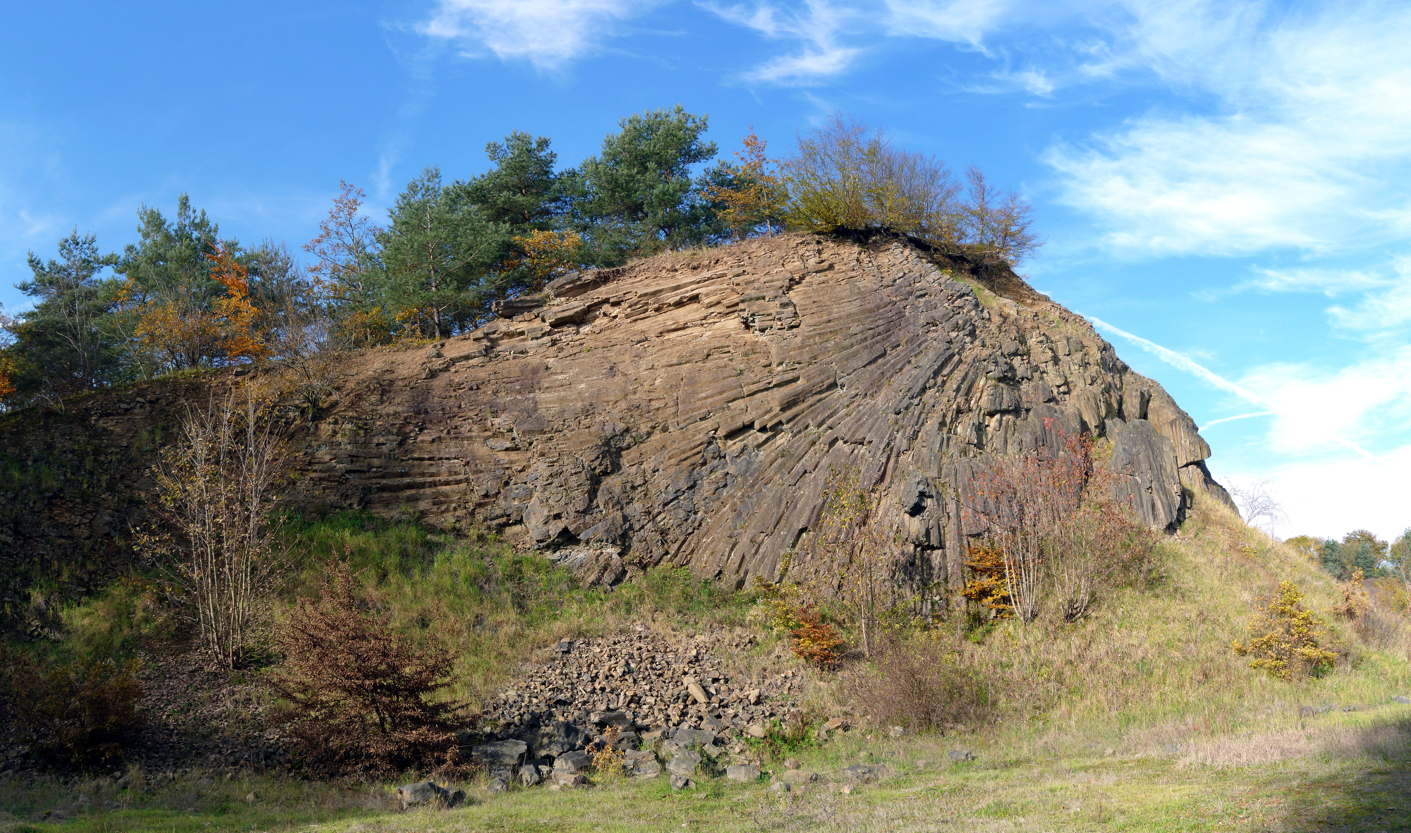 Lindenstumpf